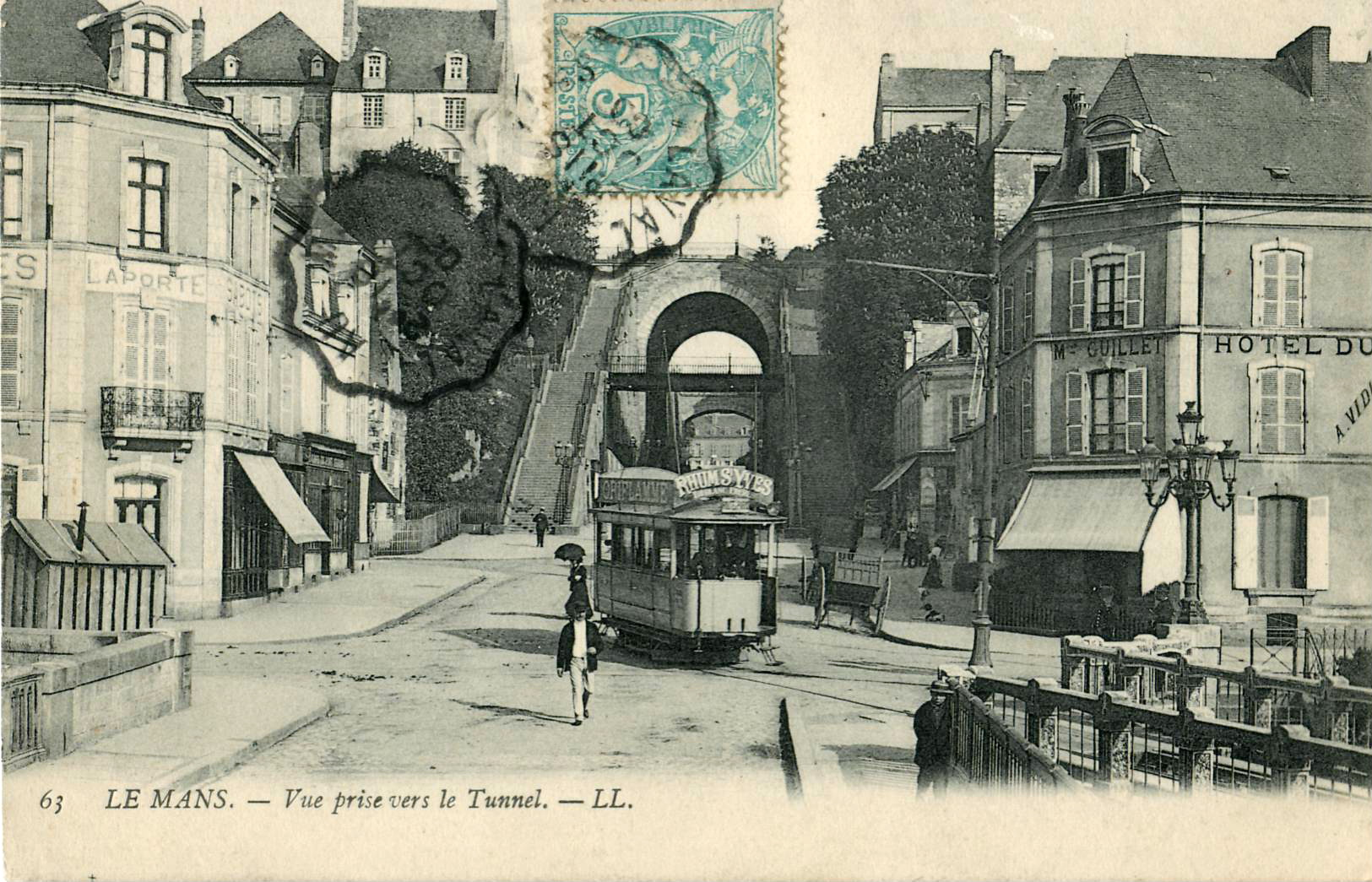 Carte postale ancienne éditée par LL, n°63 : LE MANS - Vue prise vers le Tunnel